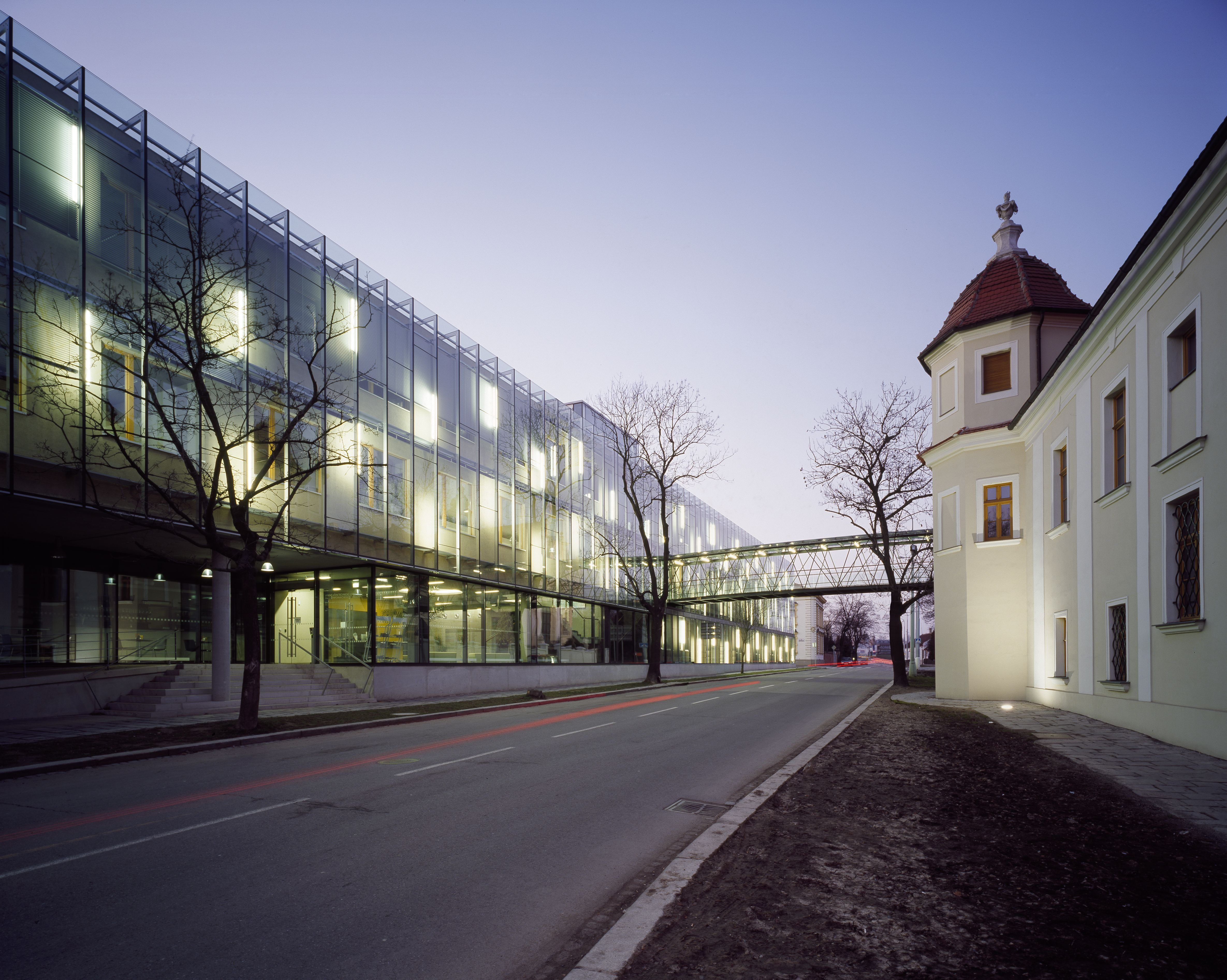 Budova Fakulty informačních technologií v Brně